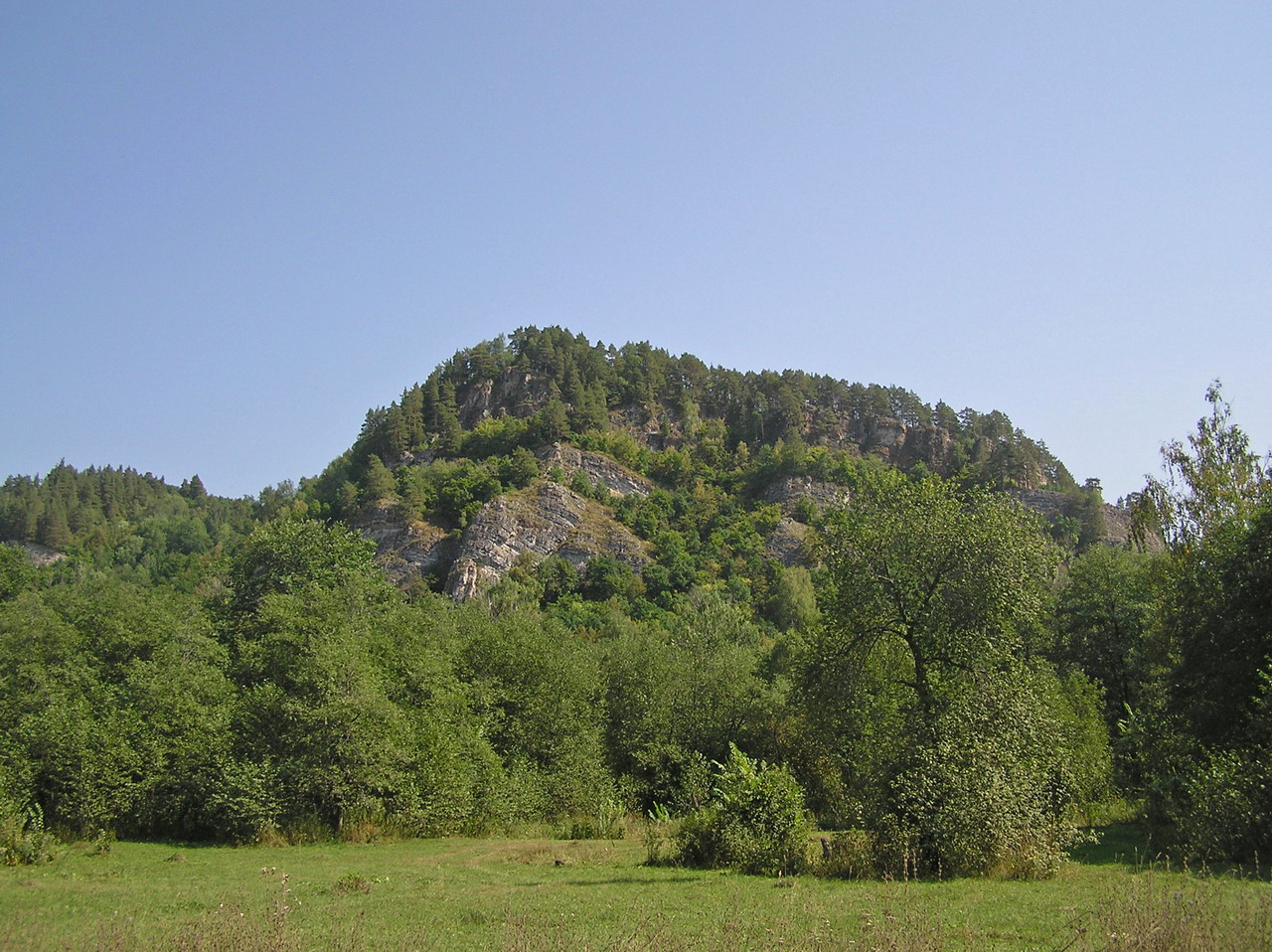 Дорога из Макарово к п.Салавата